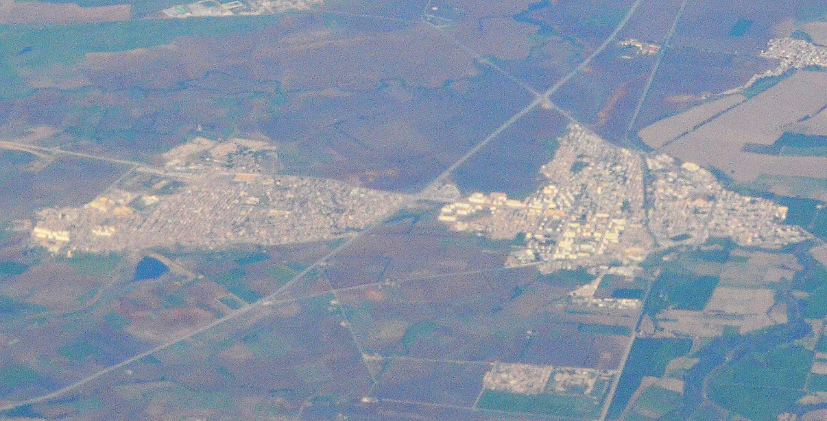 Vue aérienne de Drean